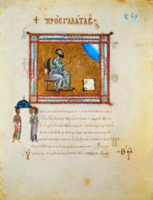 Беларуская (тарашкевіца): Малюнак перад лістом Паўла да Галатаў